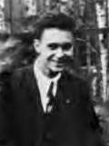 Jan Tinbergen